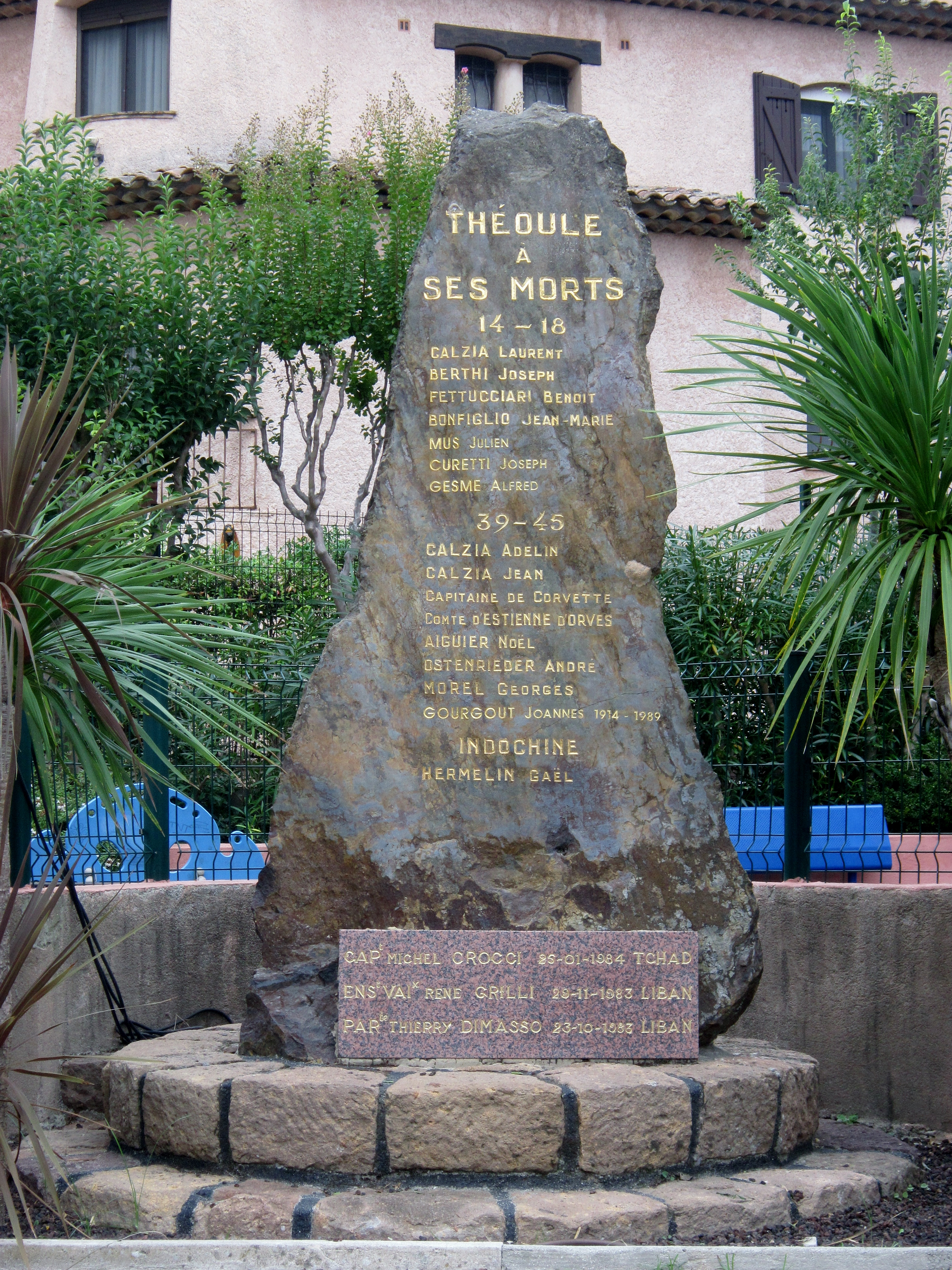 Le monument aux morts de Théoule-sur-Mer.